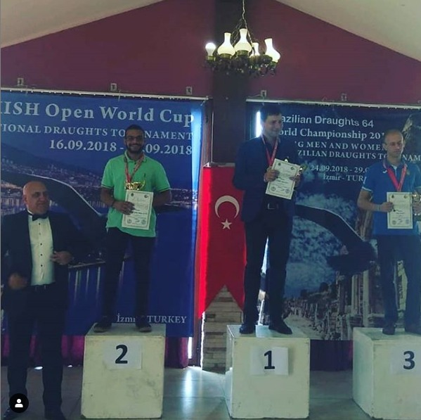 Foto da premiação do Campeonato Mundial na Turquia